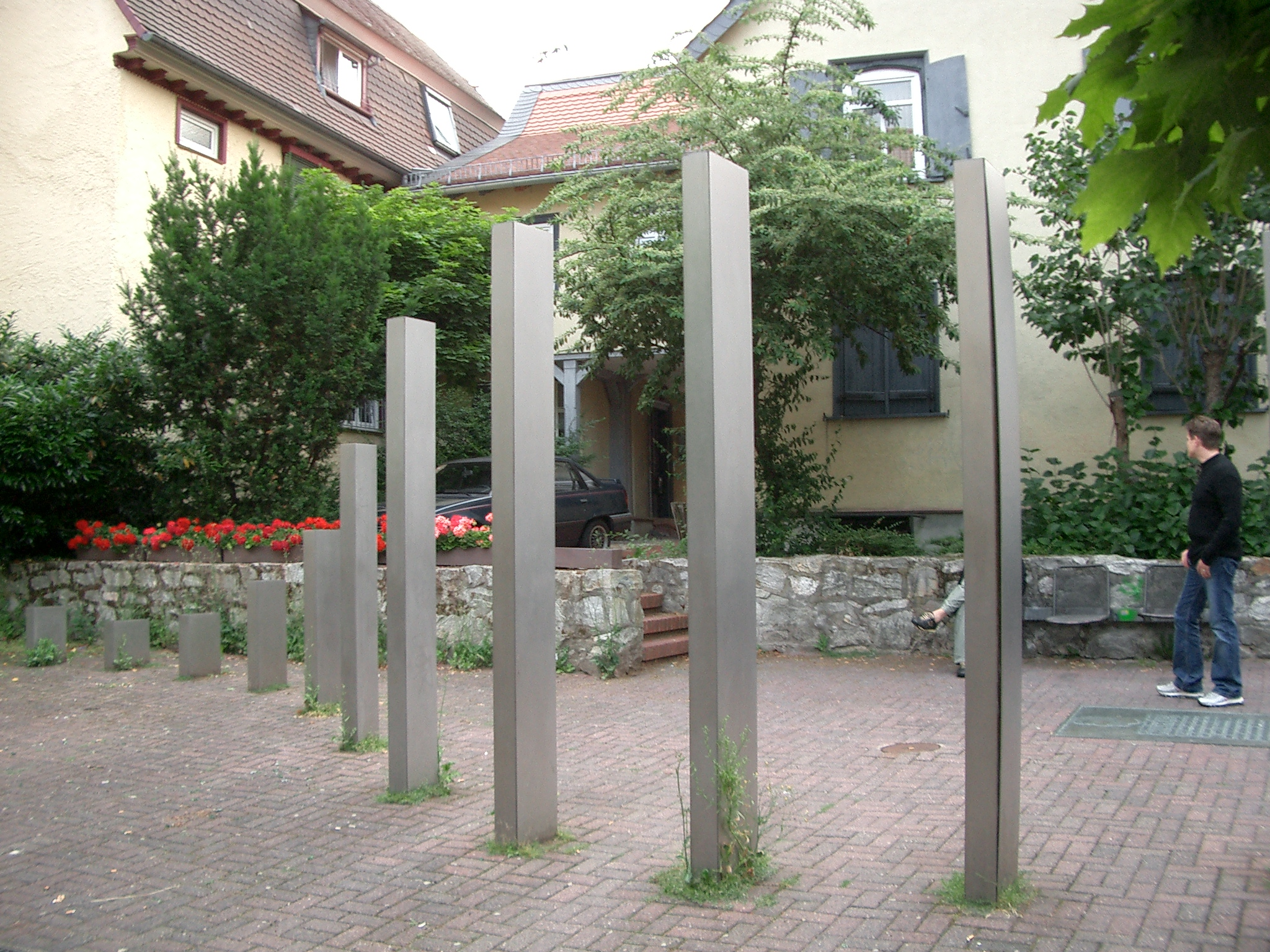 Sinuskurve